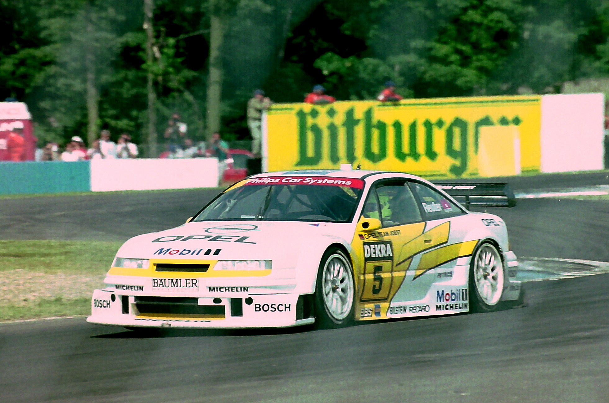 Manuel Reuter - Opel Team Joest - Opel Calibra V6 exits The Esses